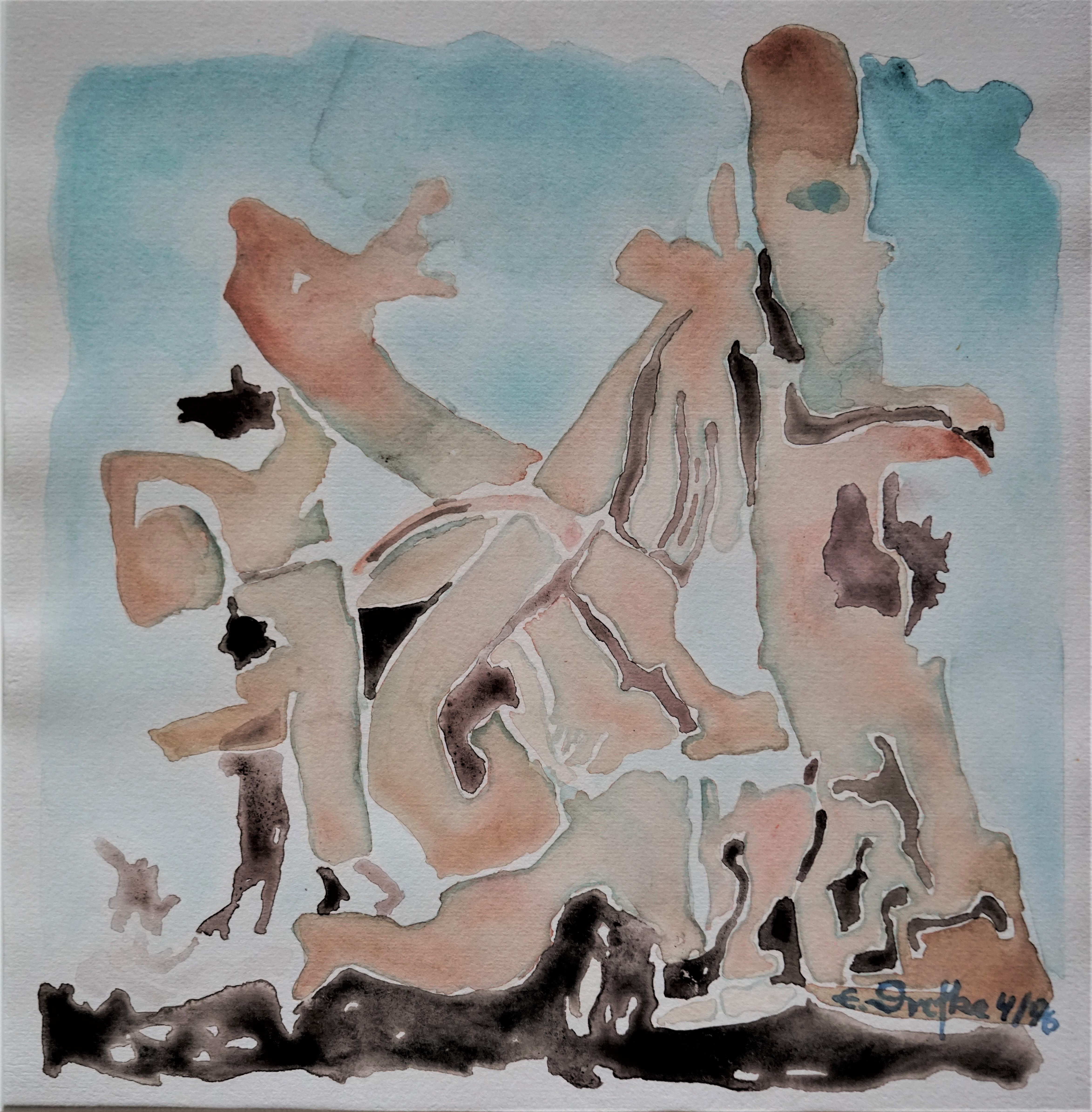 E. Drefke: Cappricio 22 (1996). Foto: Peter Dörp